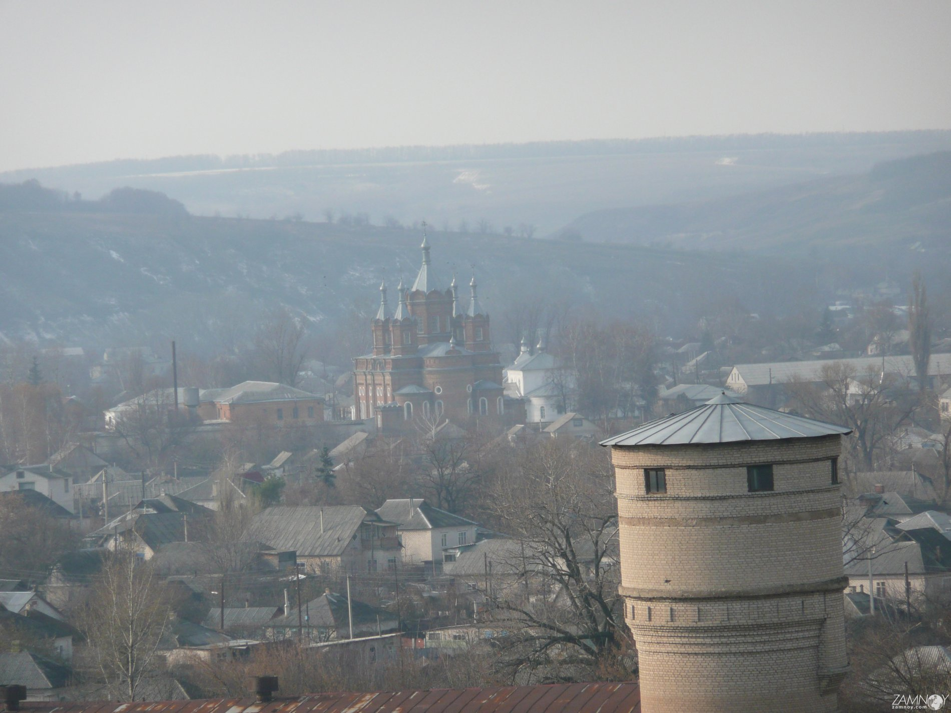 Старобельский Скорбященский женский монастырь сверху.